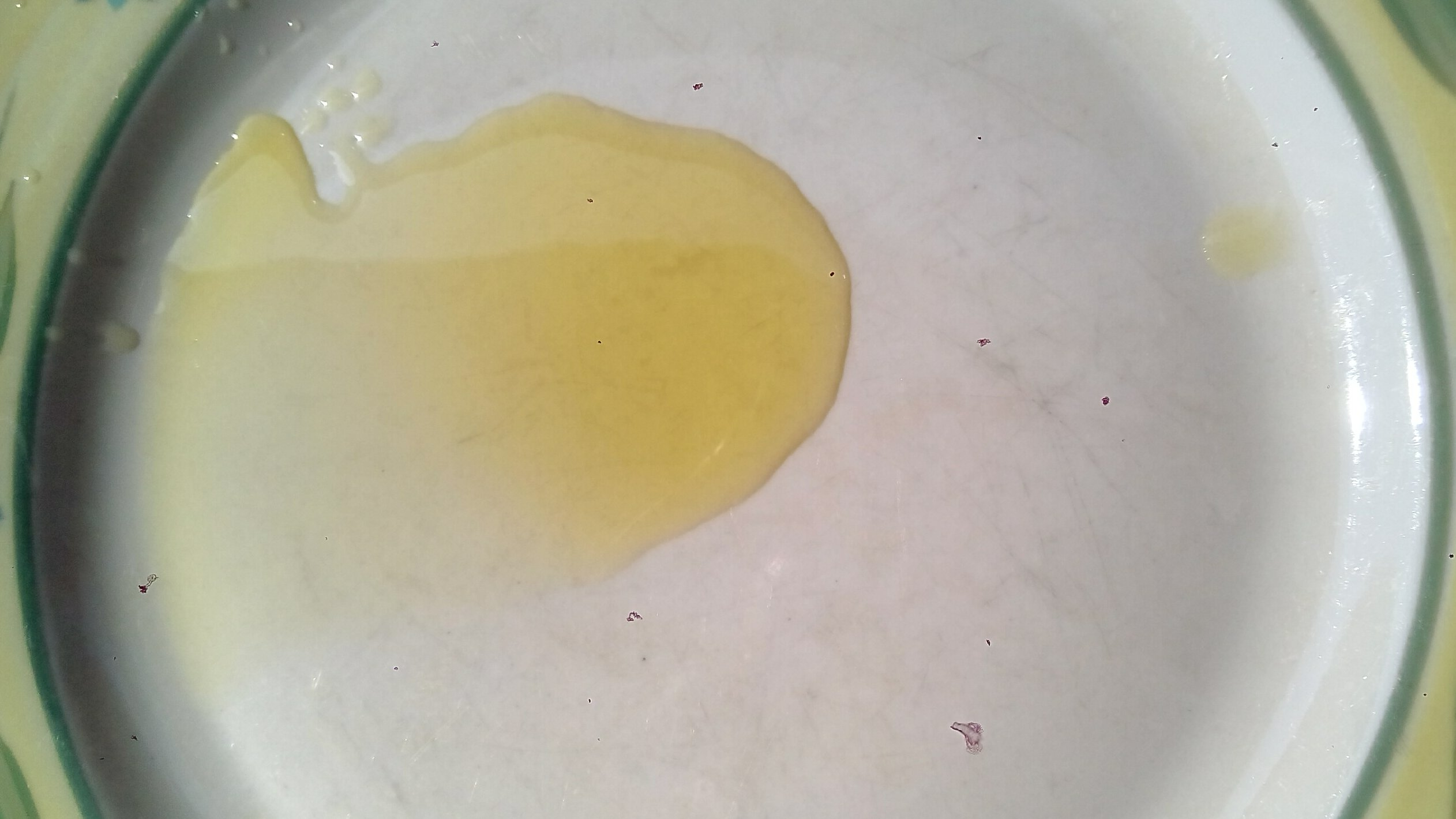 Piattino olio salentino cellina ogliarola